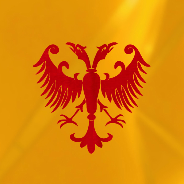 Опис слике: Краљевска застава Стефана Уроша IV Душана Немањића (1308-1355), краља Србије (владао: 1331-1345)